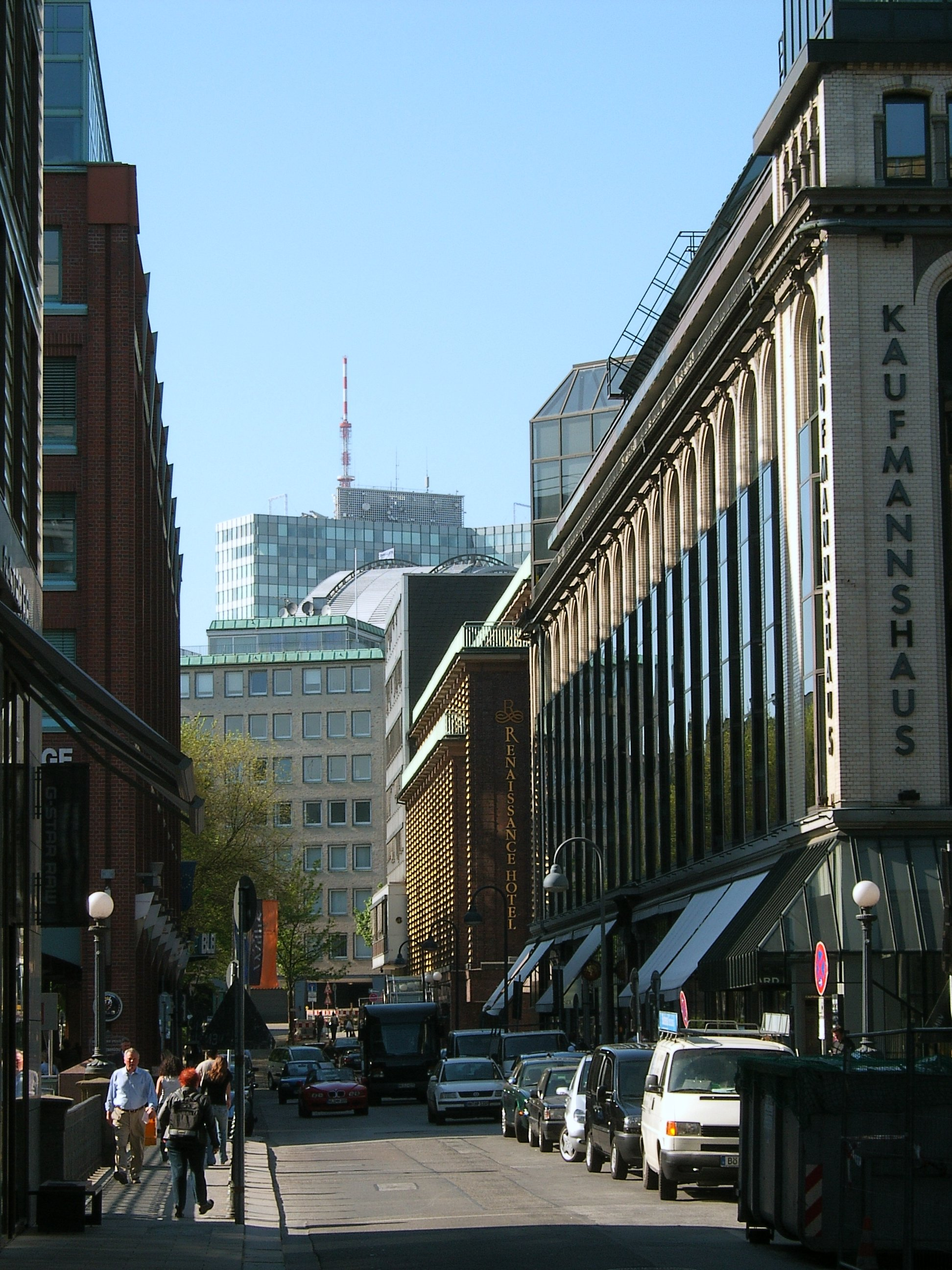 Hamburg, Innenstadt, Kaufmannshaus